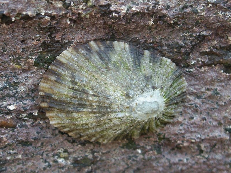 ヨメガカサ, 長崎市柿泊 (Cellana toreuma, Kakidomari, Nagasaki)